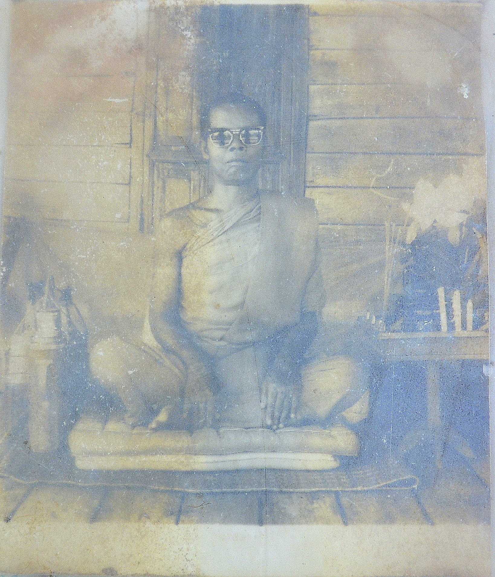 หลวงปู่บุญจันทร์ เกศาโร